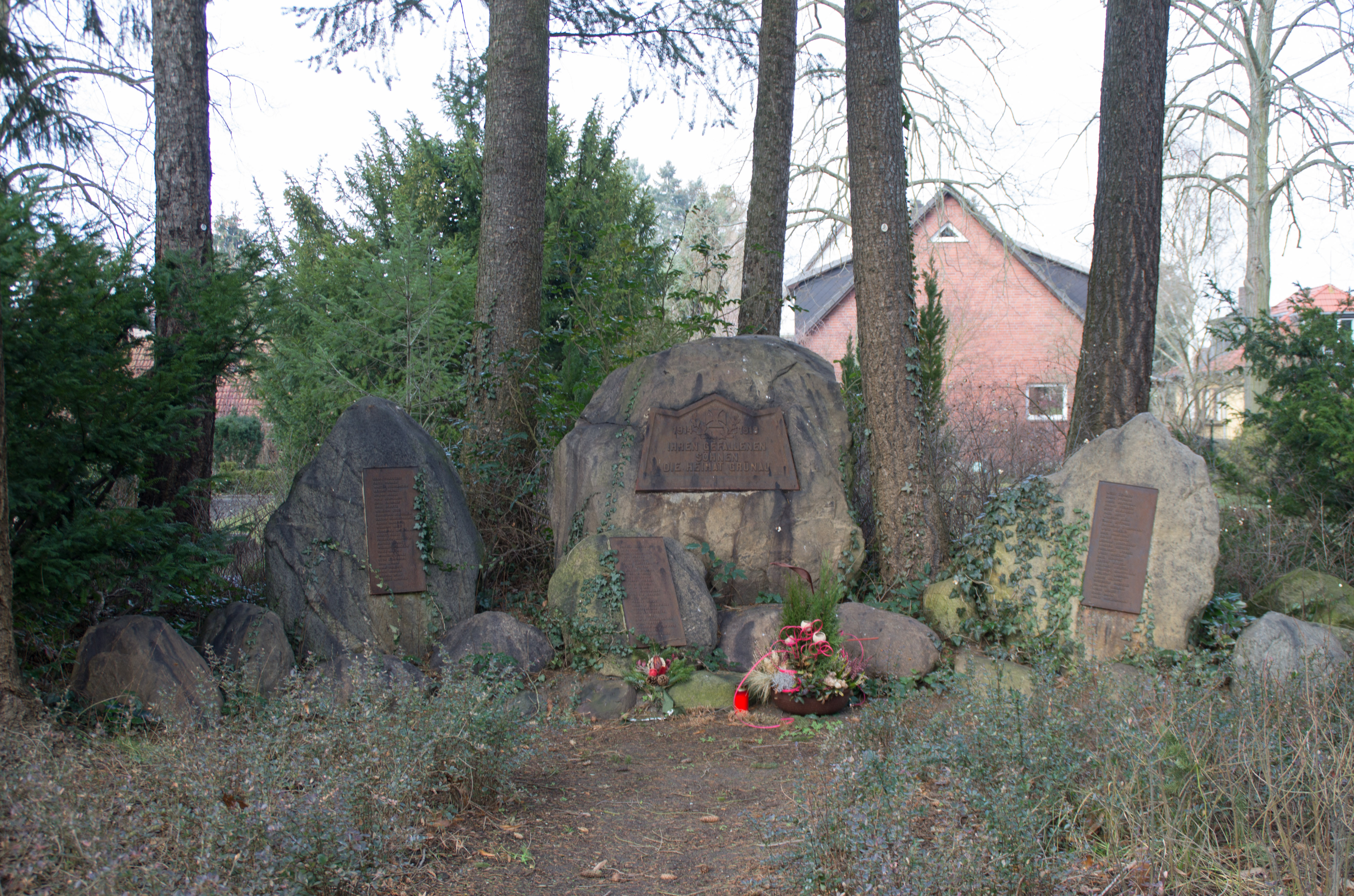 Berlin-Grünau: Auf dem Friedhof befindet sich ein Denkmal für die Gefallenen des Ersten Weltkrieges.